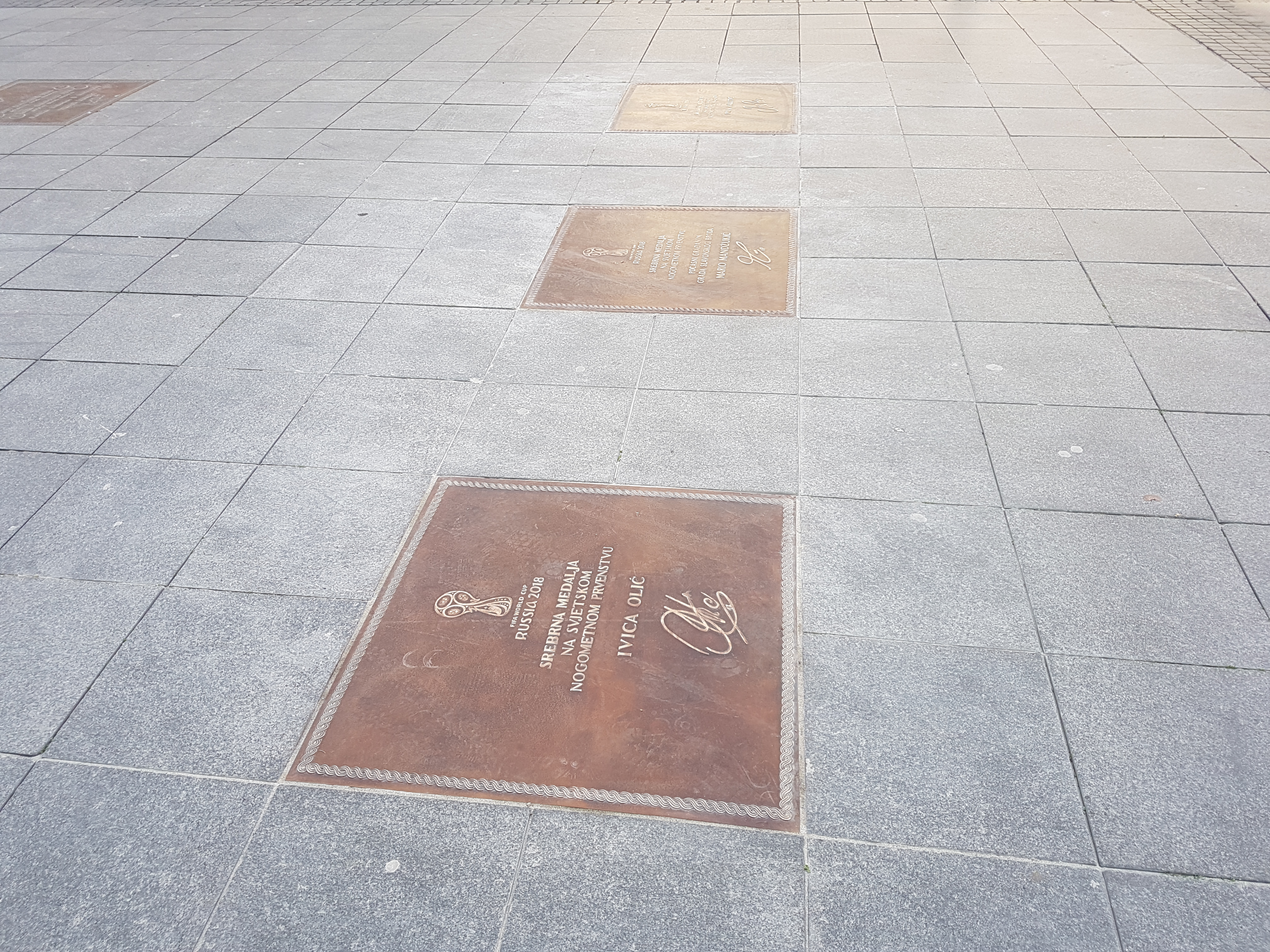 Ploče uspješnim sportašima